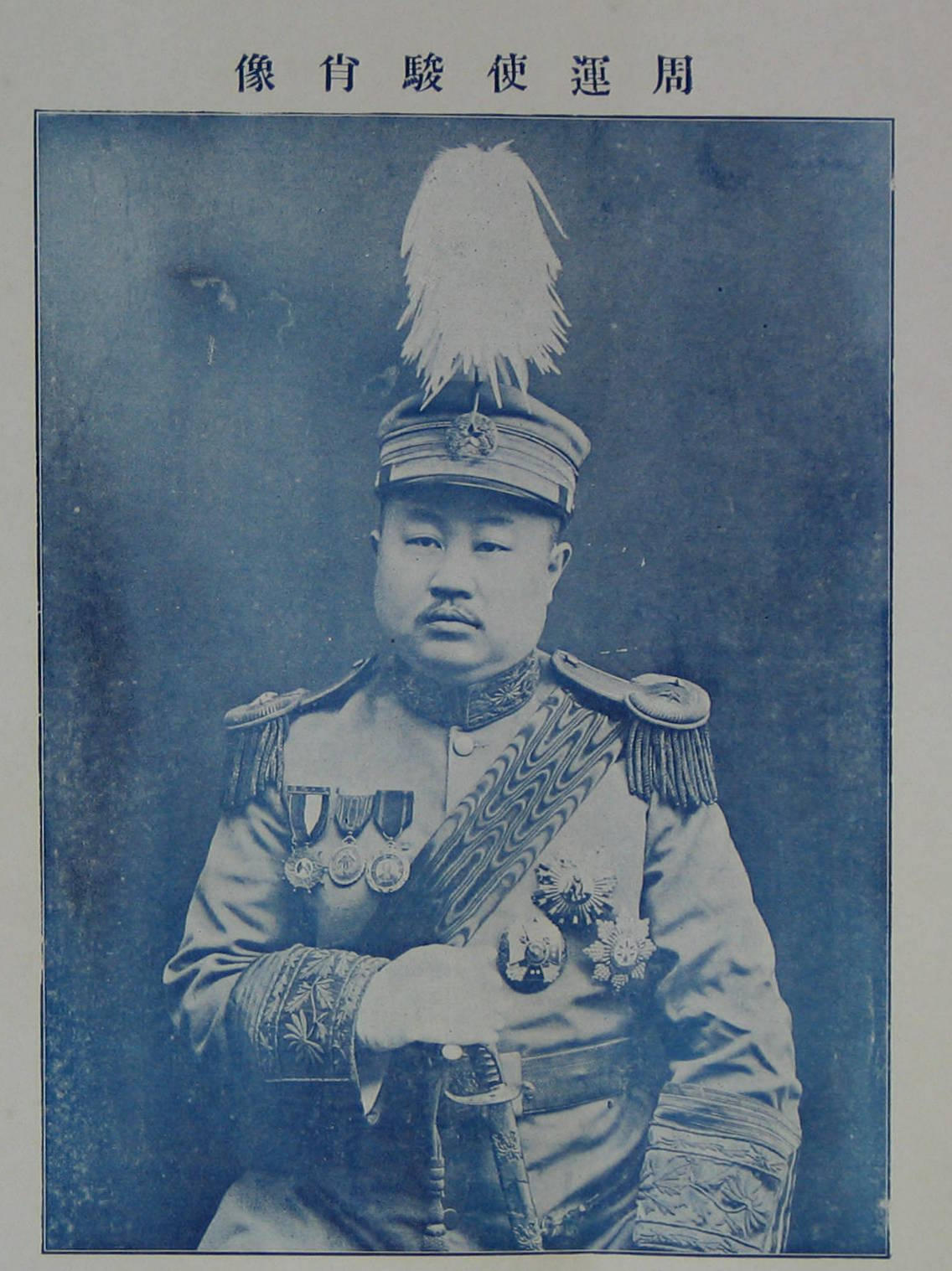 中文（台灣）: 四川鹽政史圖冊 吳煒等撰 民國二十一年(1932)四川運使署排印本